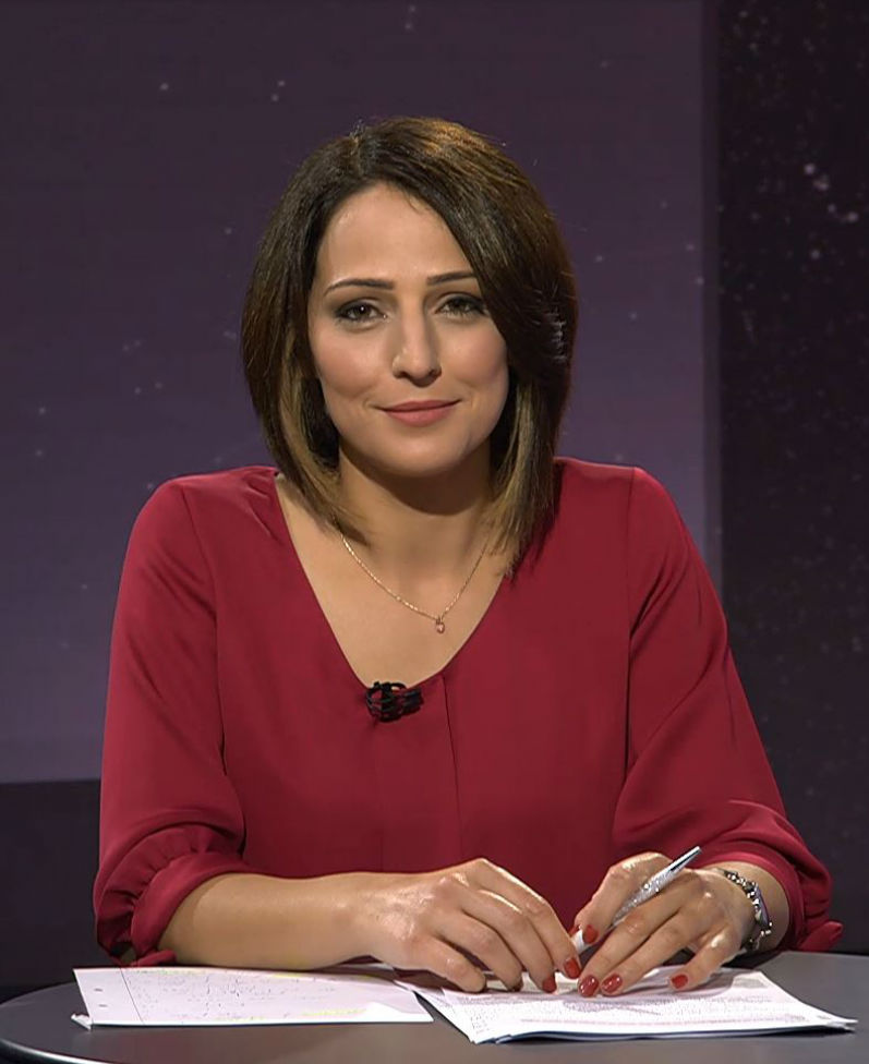 רדיר כמאל מריח